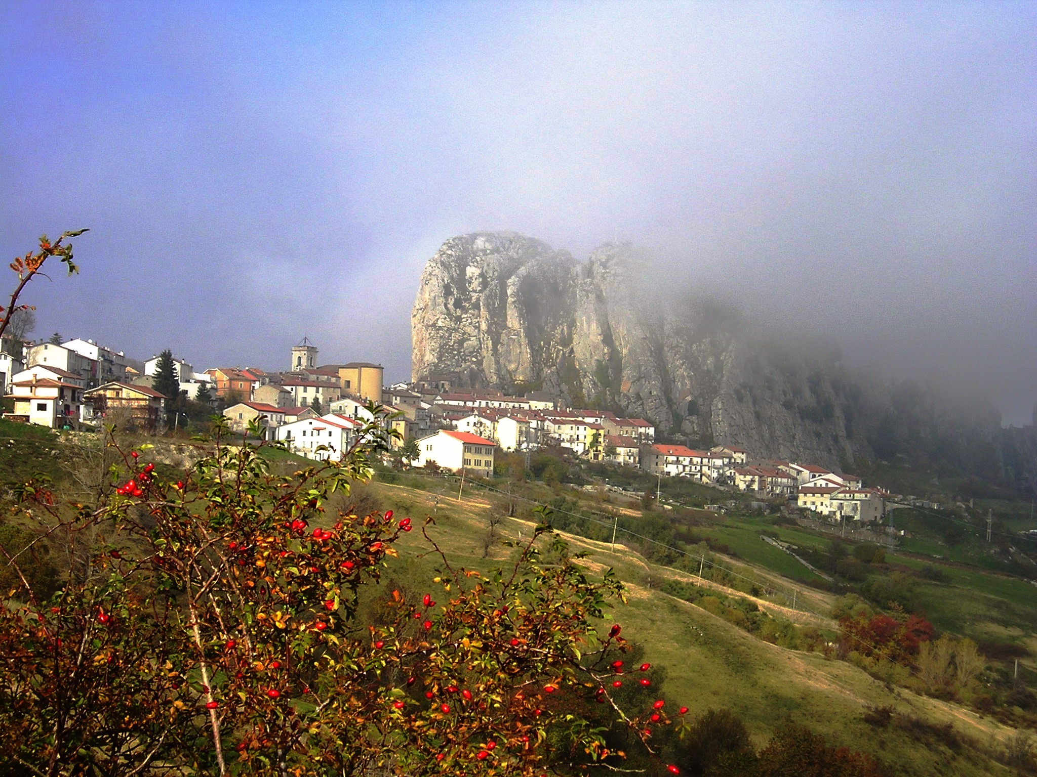 Pizzoferrato, provincia di Chieti